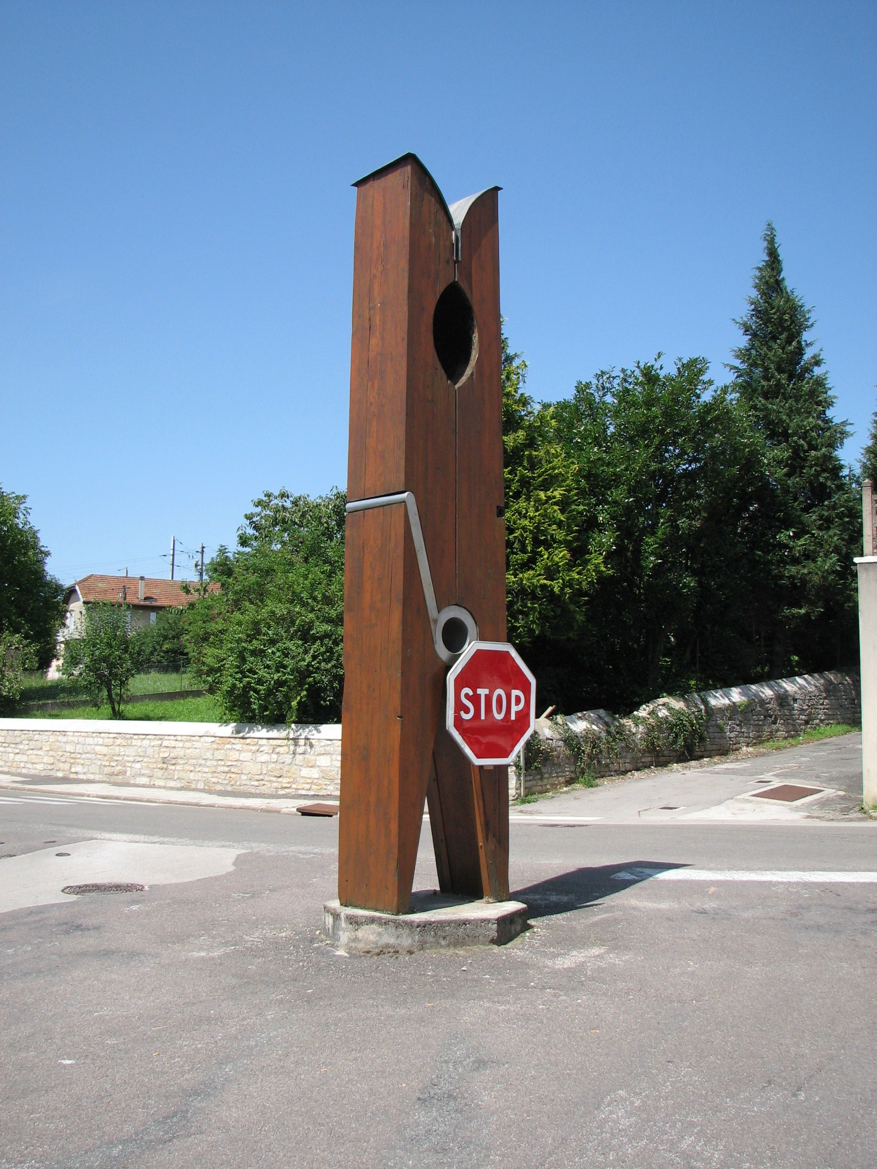 Pince à linge géante à Mouchard dans le JuraGiant clothespin in Mouchard in Jura (France)